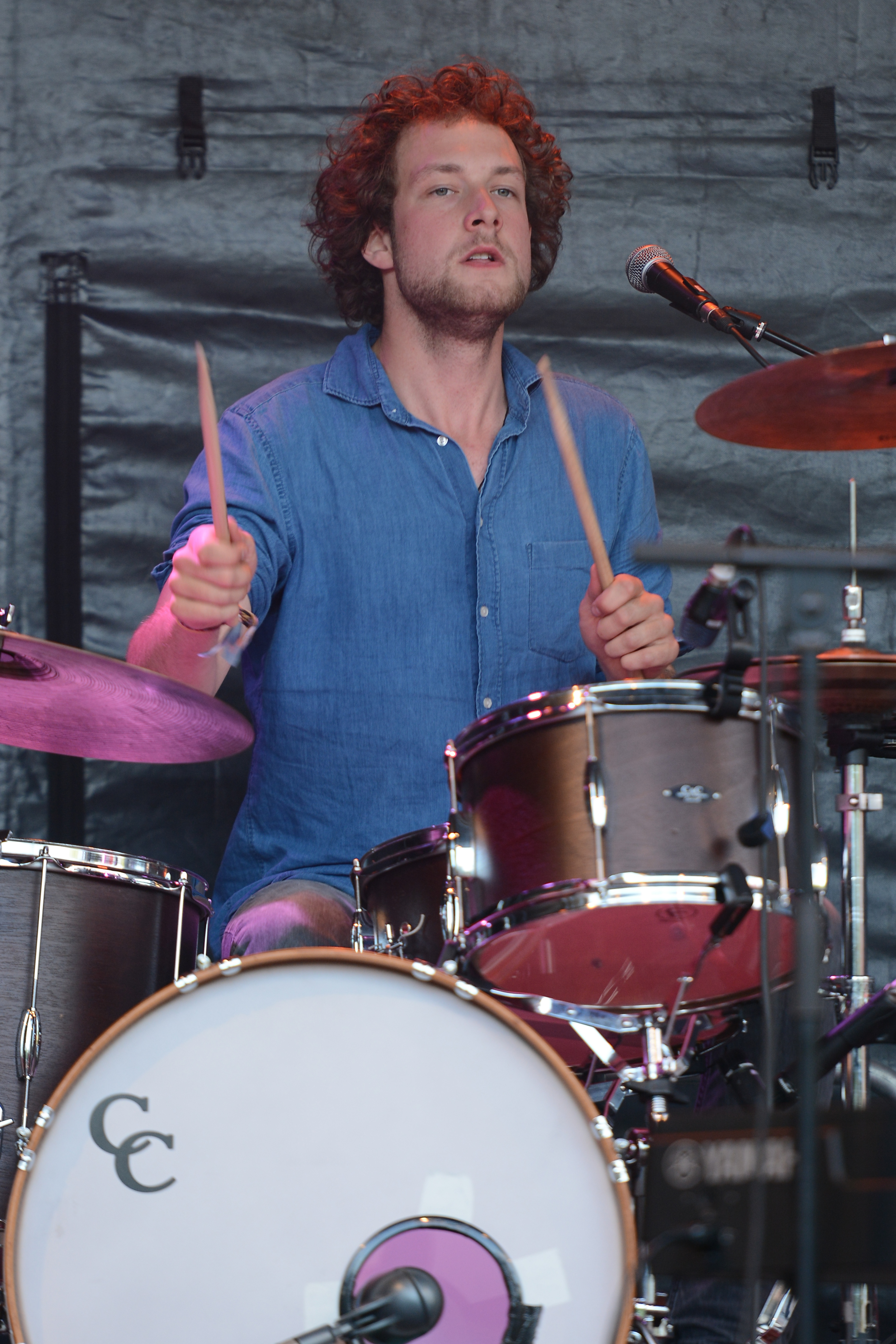 AnnenMayKantereit beim Traumzeit-Festival 2014